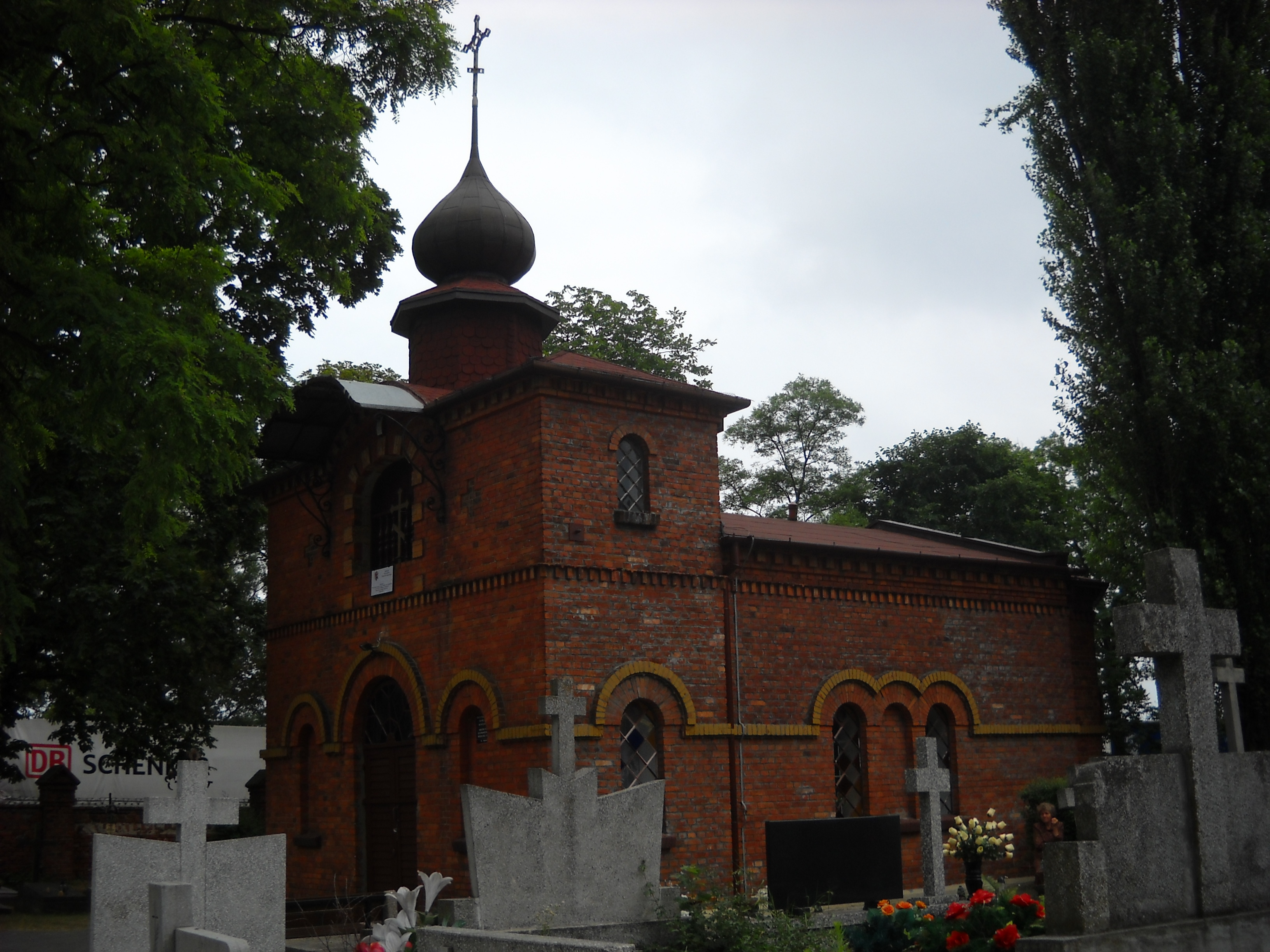 Cerkiew św. Mikołaja we Włocławku